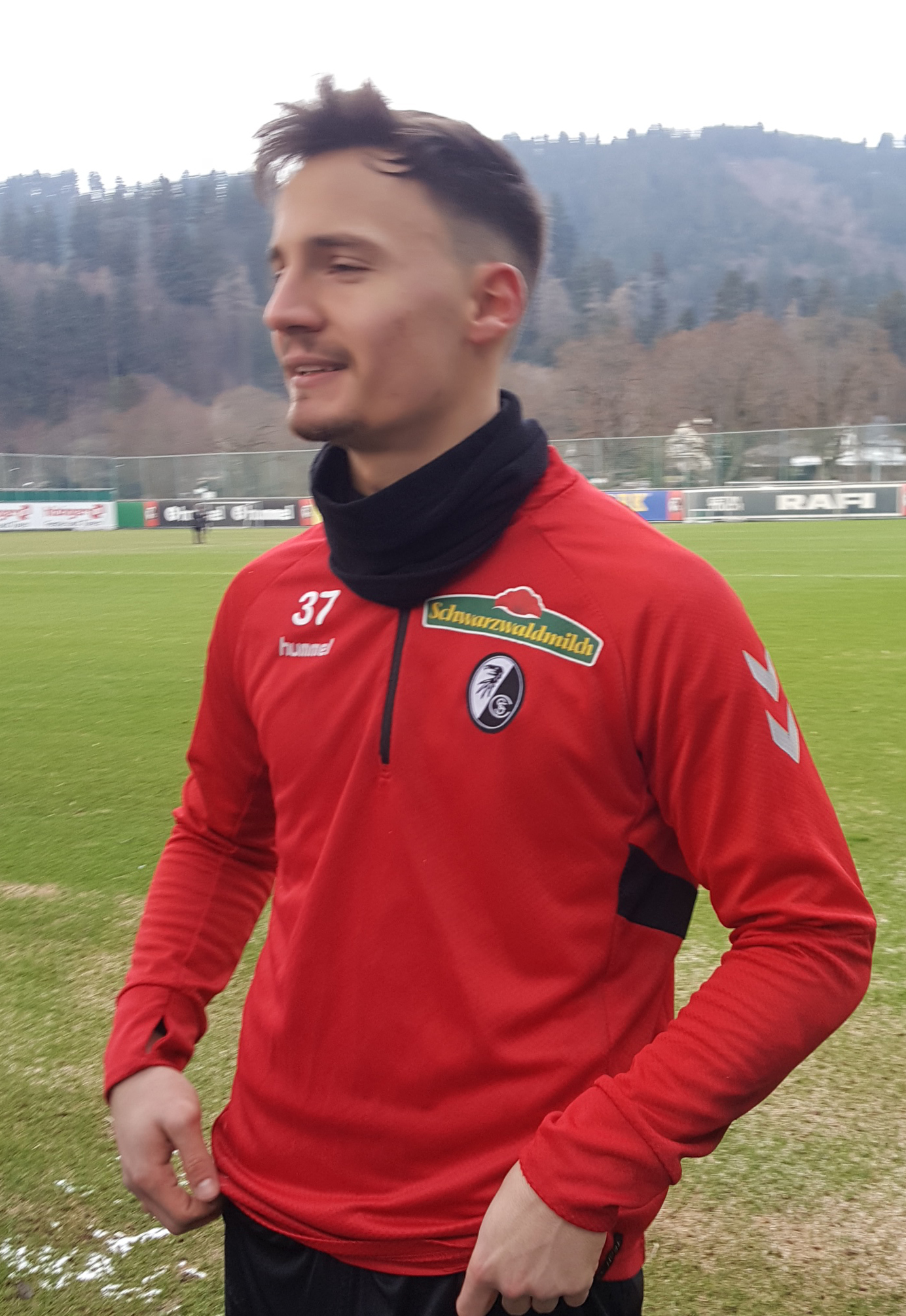 Constantin Frommann nach dem SC Freiburg-Training am 4. Januar 2019